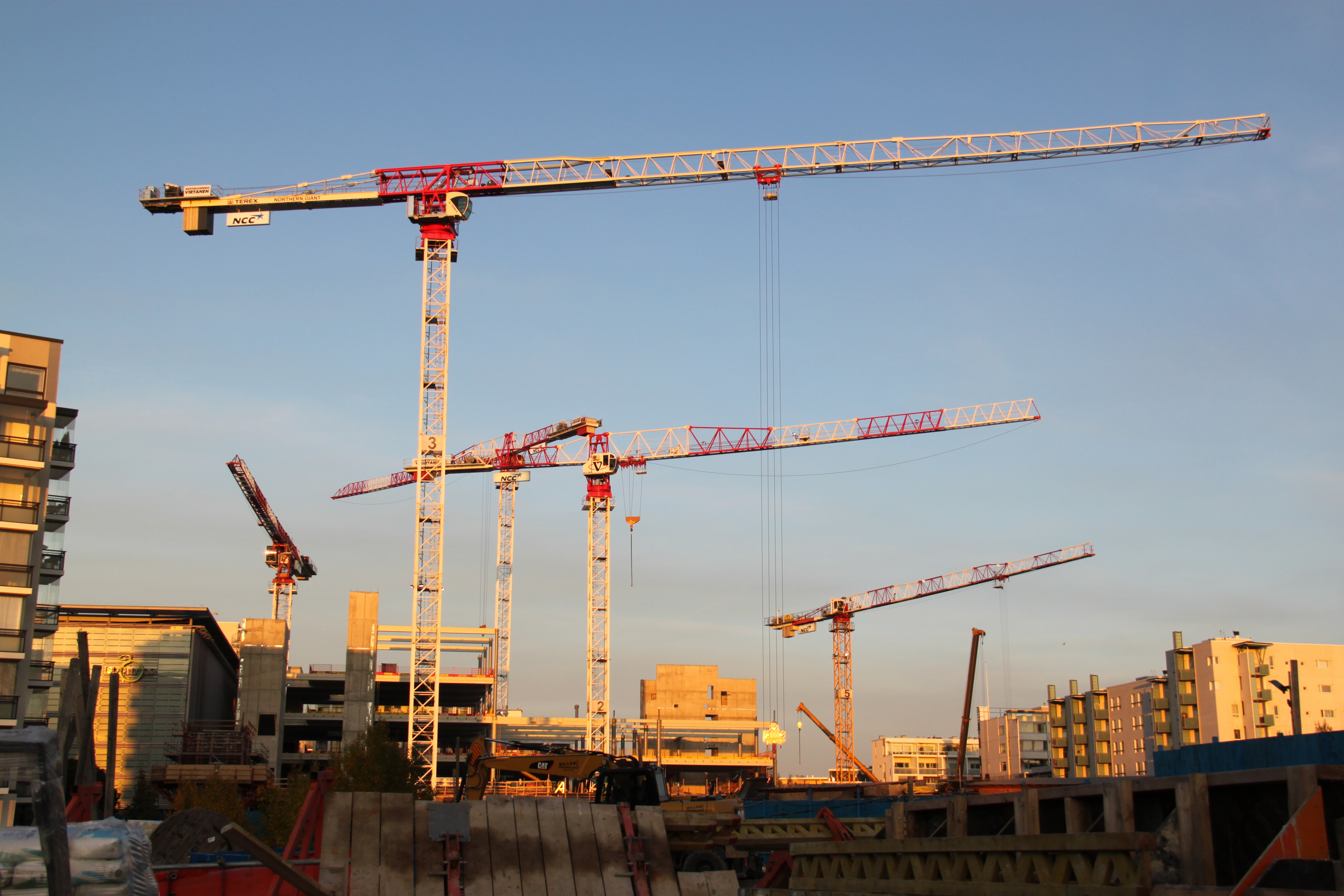 Matinkylän metroasema ja Iso Omenan laajennus rakenteilla lokakuussa 2014.